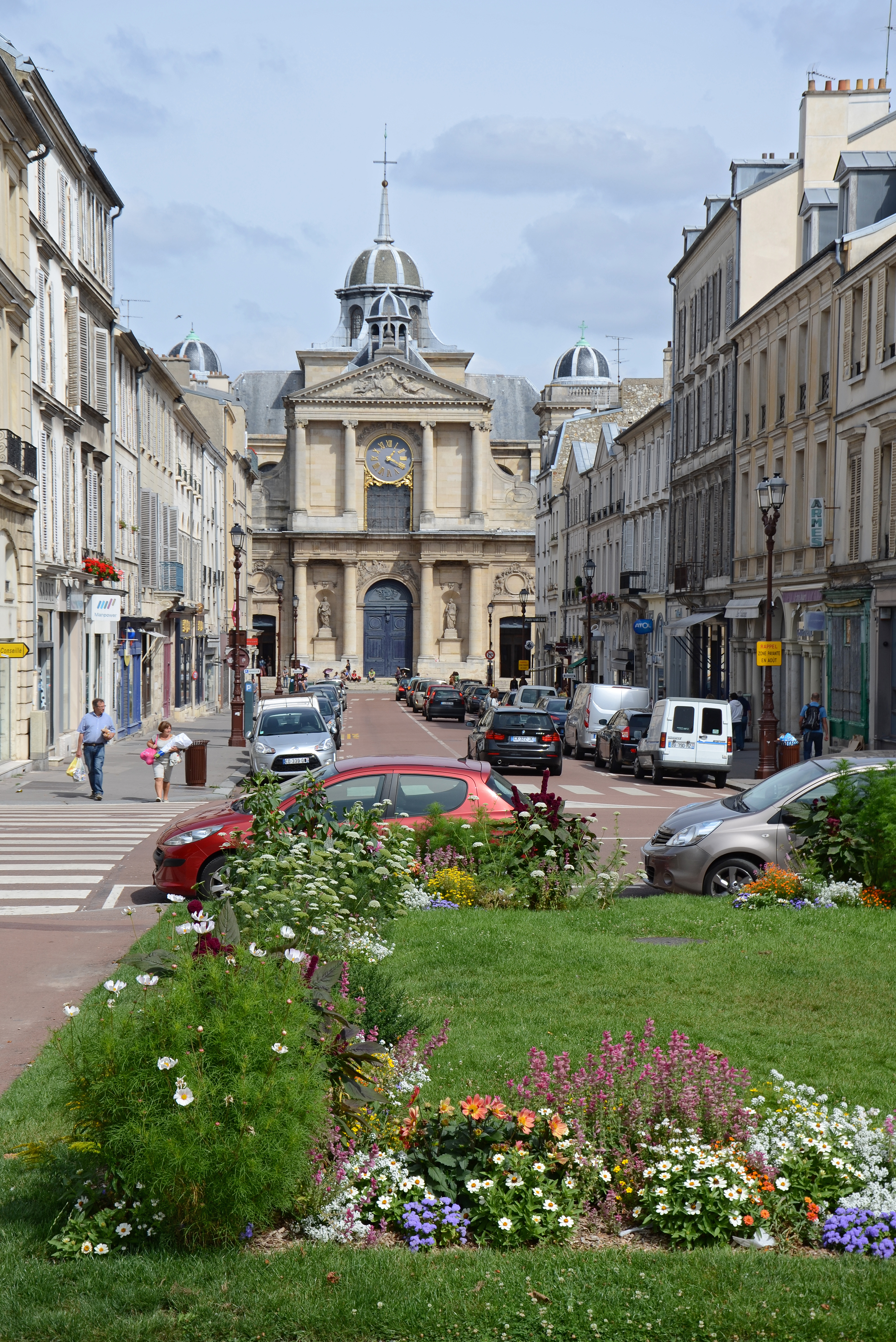 Église Notre-Dame et rue Hoche vues de puis la place Hoche , Versailles, Yvelines, France .